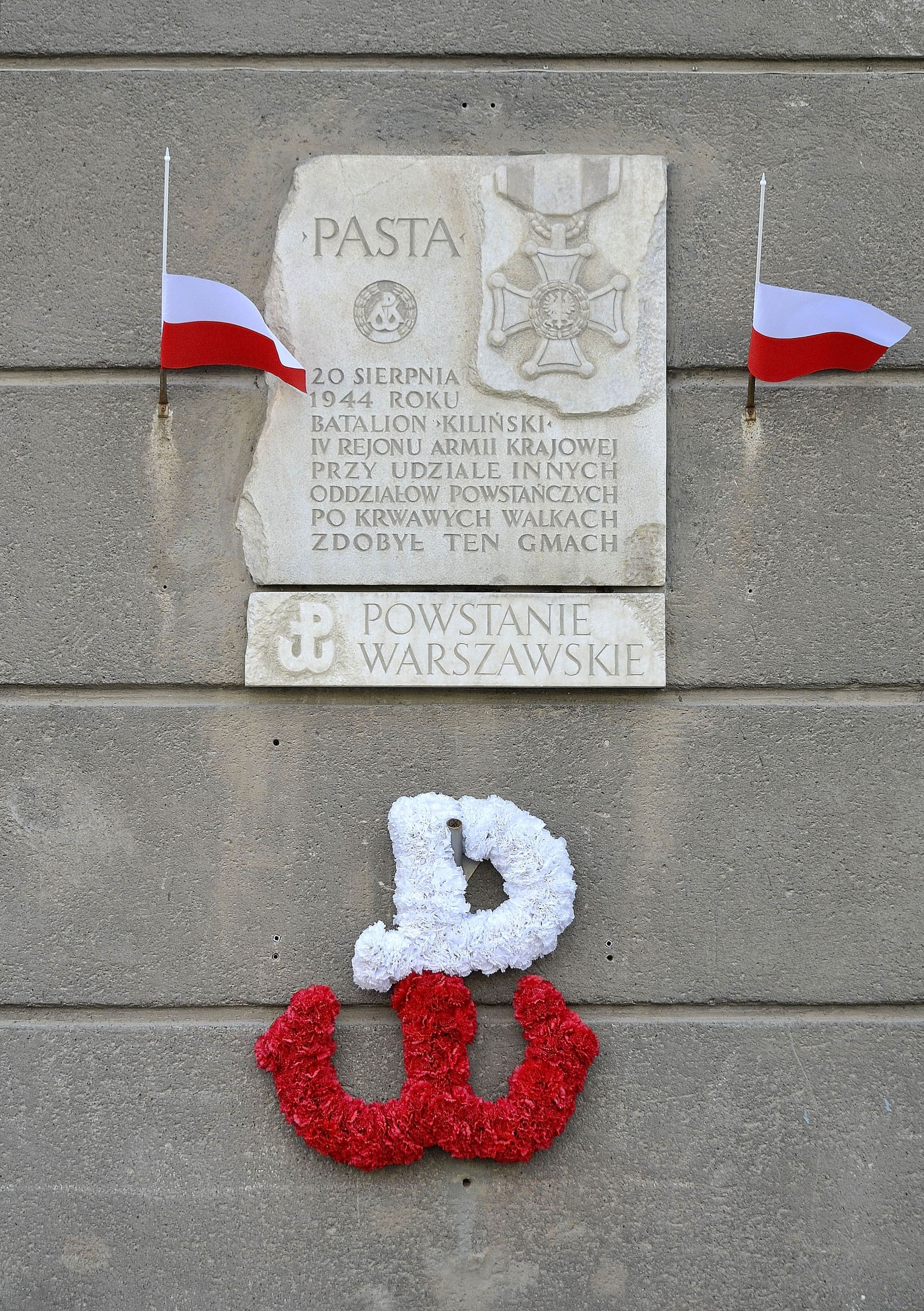 Tablica upamiętniająca zdobycie PAST-y na budynku przy ul. Zielnej 39